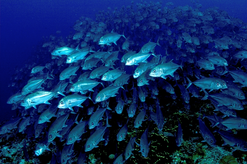 Ein Fischschwarm